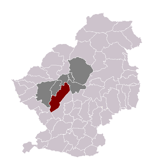 Sin-le-Noble dans son canton et son arrondissement